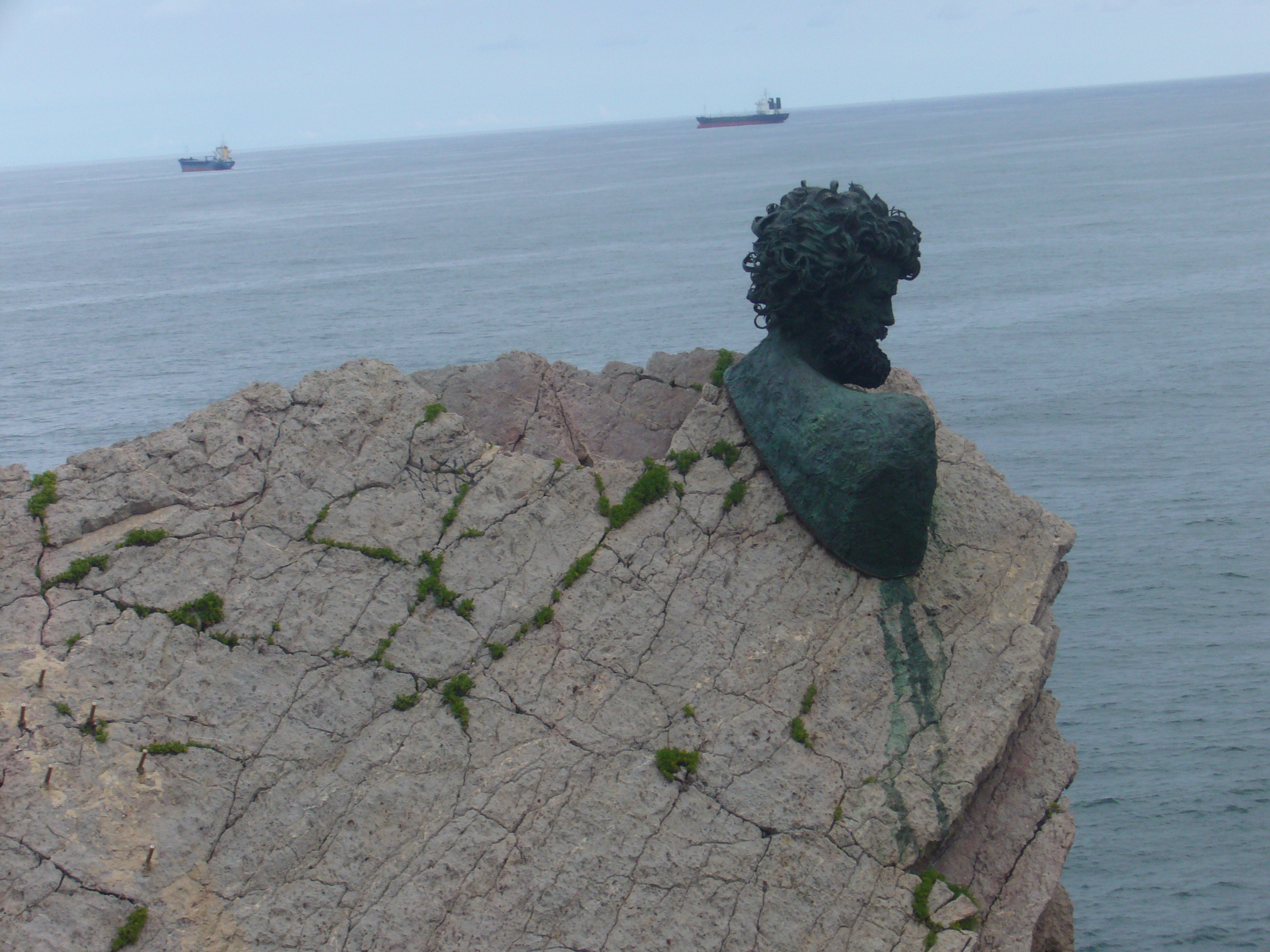 Busto de Philippe Cousteau en el Museo de Anclas Philippe Cousteau, instalado en La Peñona de Salinas